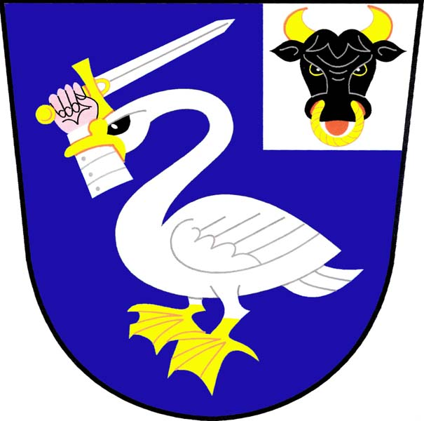 Znak obce Křtěnov